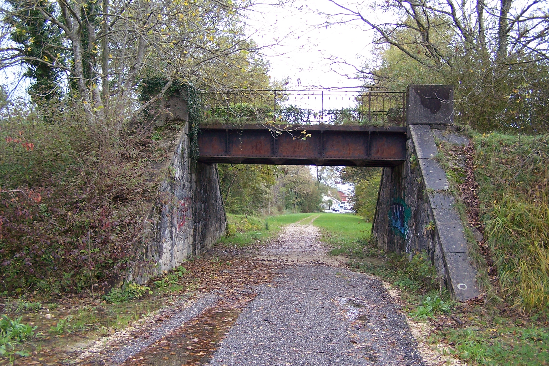 Brücke über die ehemalige Bahnstrecke Nyon–Crassier in der Nähe von Crassier, Blick in Richtung Crassier.